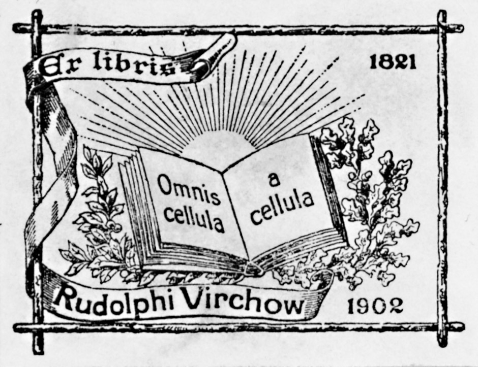 Ex-libris der Virchow-Bibliothek, mit dem Motto "Omnis cellula a cellula 1821 - 1902".